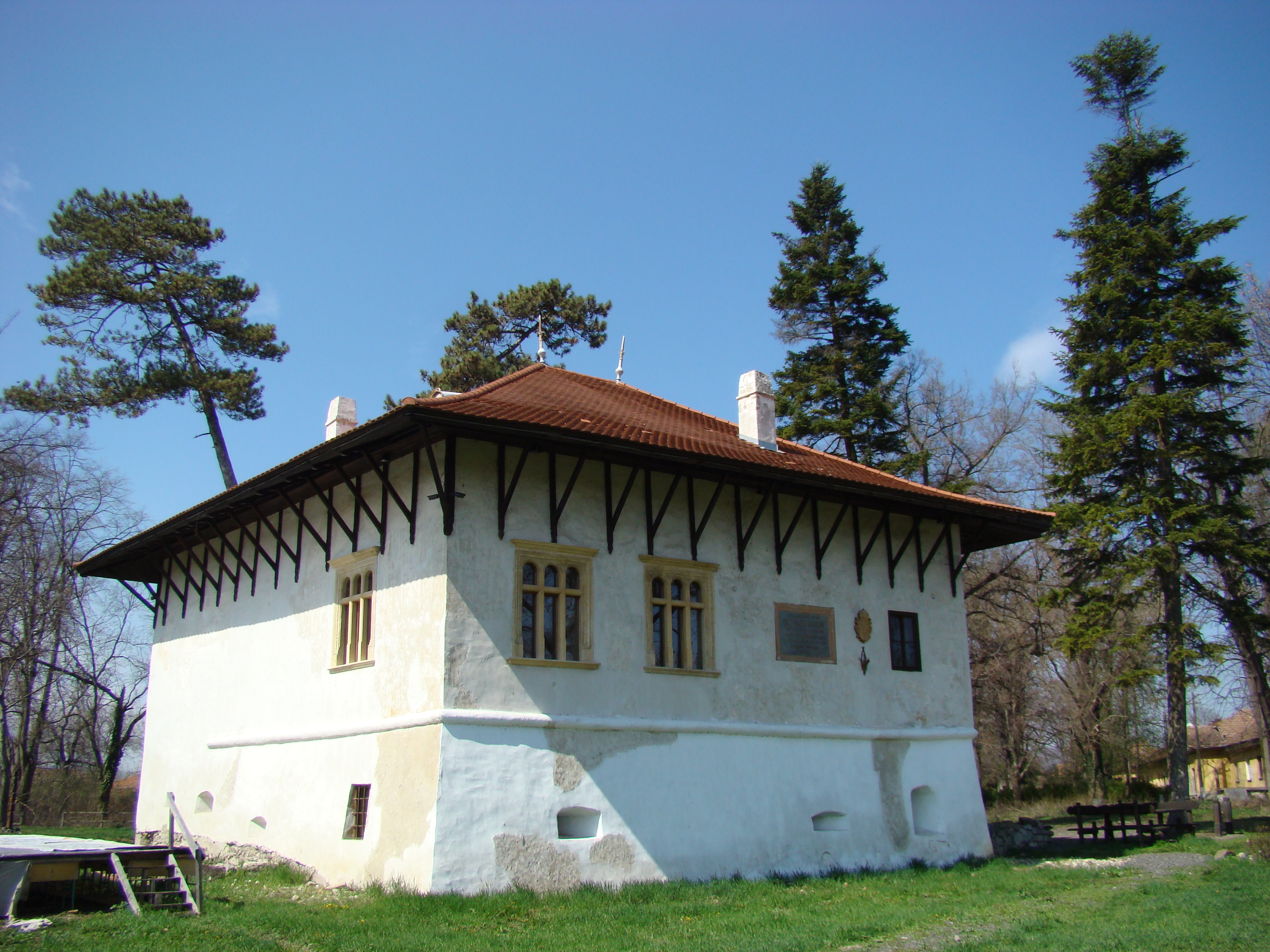 Casa natală Gabriel Bethlen (Bastionul Roşu) din Ilia